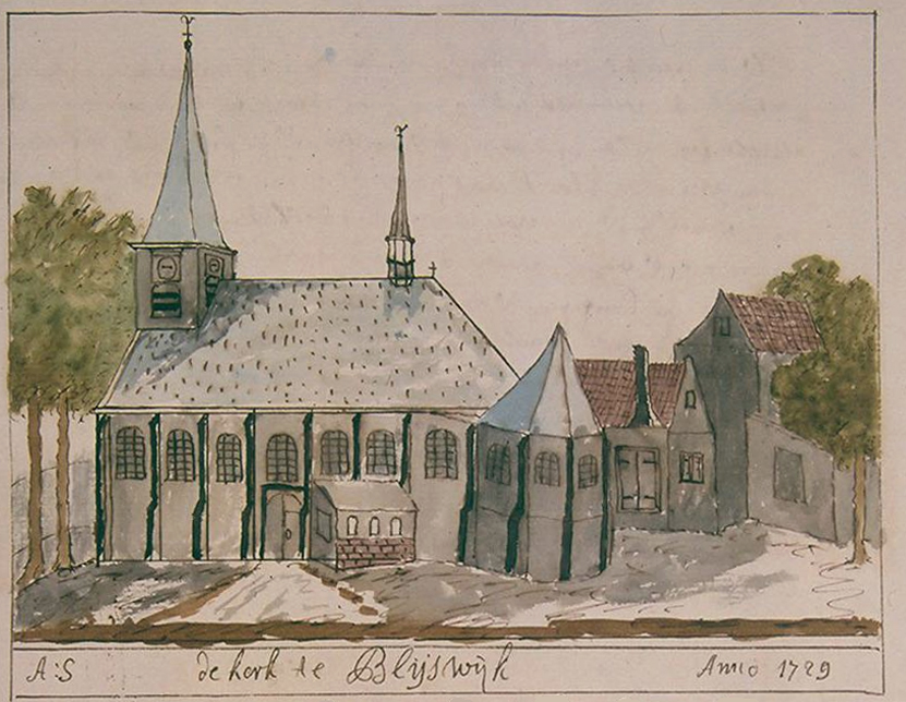 Kerk van Bleiswijk in 1729, uitsnede uit de atlas Schoemaker, tekening van Cornelis Pronk